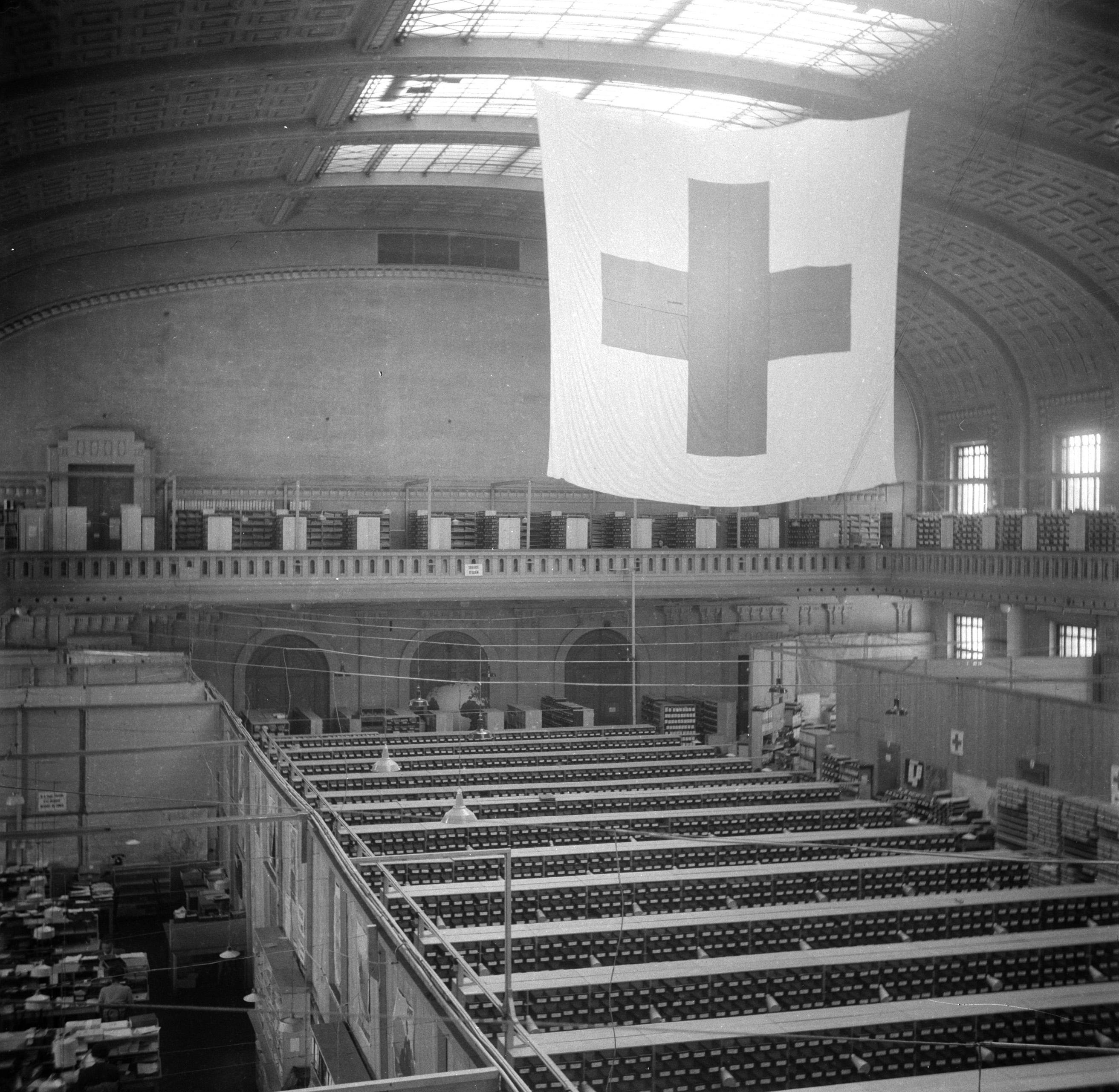 Collectie / Archief : Fotocollectie Van de Poll Reportage / Serie : Rode Kruis In Genève Beschrijving : Interieur van het kantoor Datum : mei 1946 Locatie : Genève, Zwitserland Trefwoorden : gebouwen, interieurs Instellingsnaam : Rode Kruis Fotograaf : Poll, Willem van de Auteursrechthebbende : Nationaal Archief Materiaalsoort : Negatief (6x6) Nummer archiefinventaris : bekijk toegang 2.24.14.02 Bestanddeelnummer : 254-2211